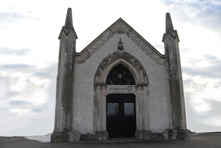 Gruftkapelle der Familien Hainisch und Fischer am Lichtenwörther Friedhof, Österreich, Neiderösterreich